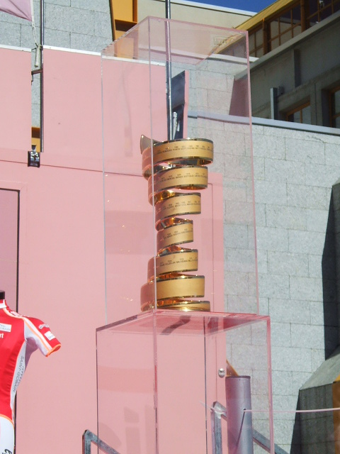 la Coppa del giro d'italia 2011